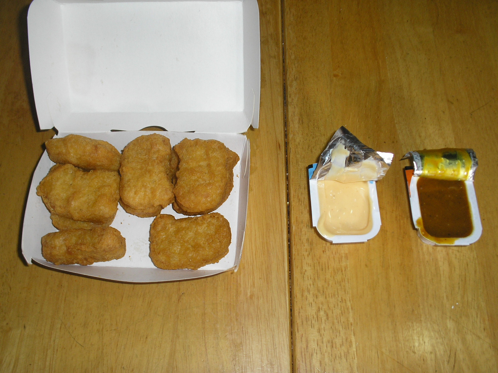 麥樂雞9件裝(全新風味醬：法式芝士醬、馬來沙嗲醬)(2010年6月)